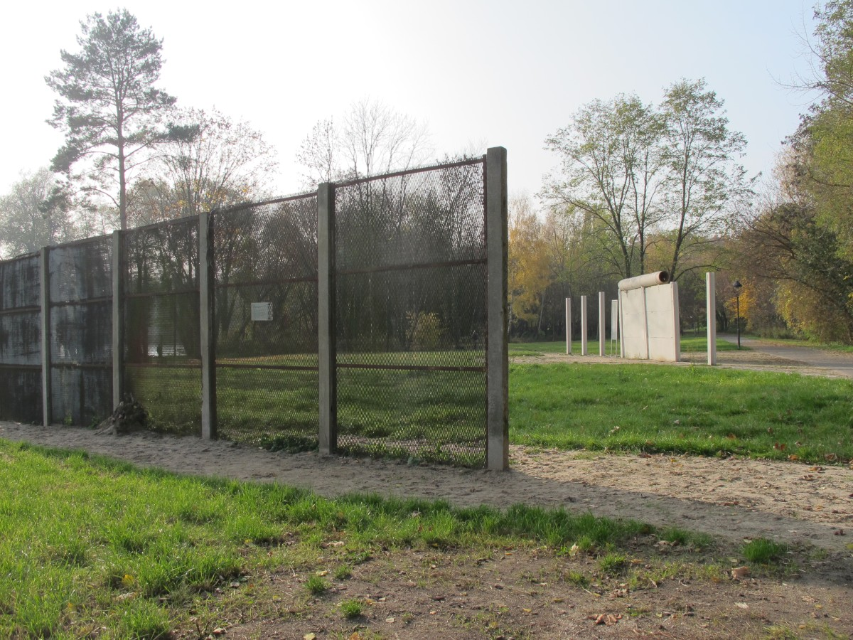 Rest der Berliner Mauer im Gutspark von Groß-Glienicke